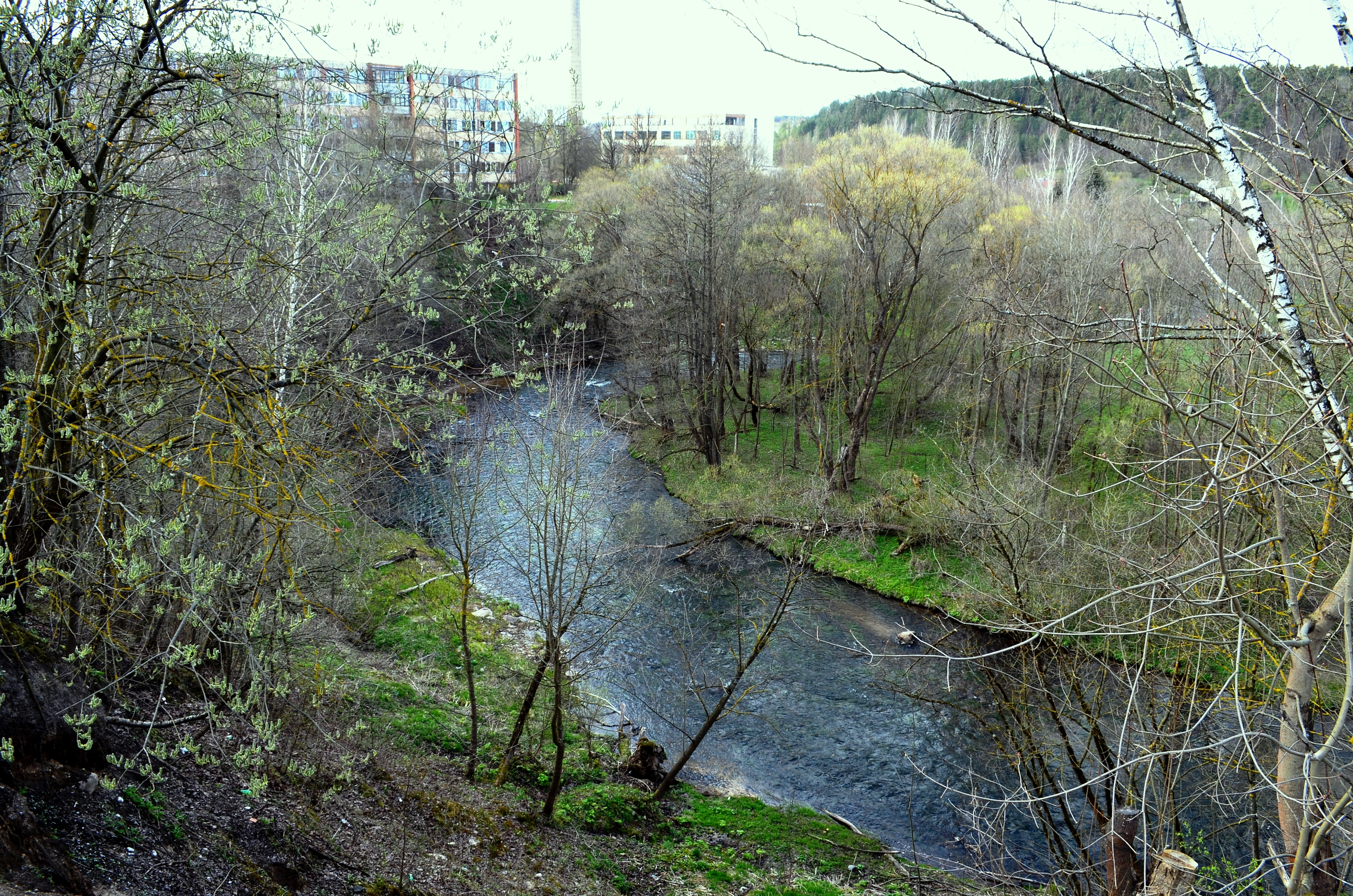 Skardinga Vilnia, Markučiai, Vilnius